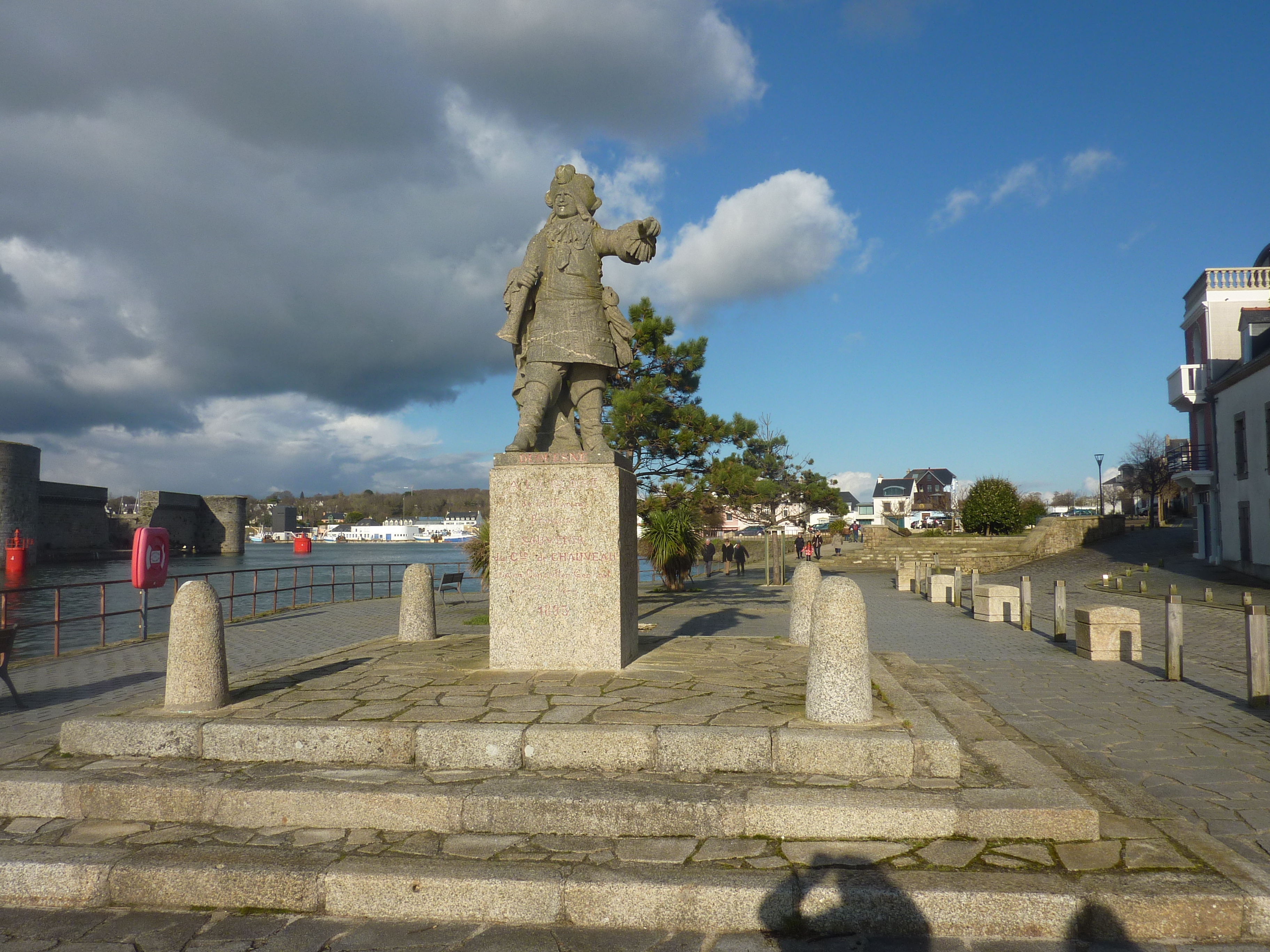 Concarneau : la statue d'Abraham Duquesne au Passage-Lanriec (par Yves Hernot fils).